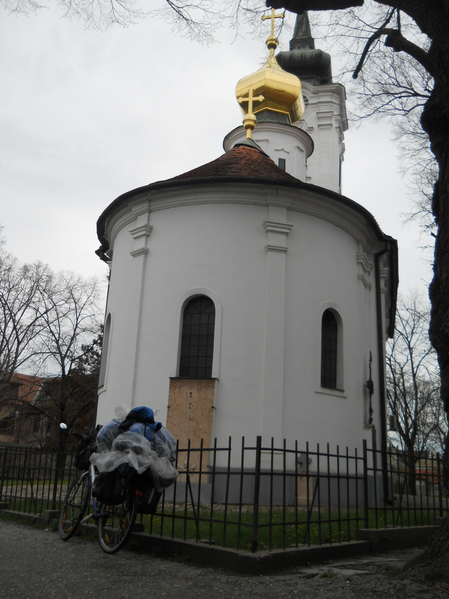 Újvidék - Nikolajevska crkva